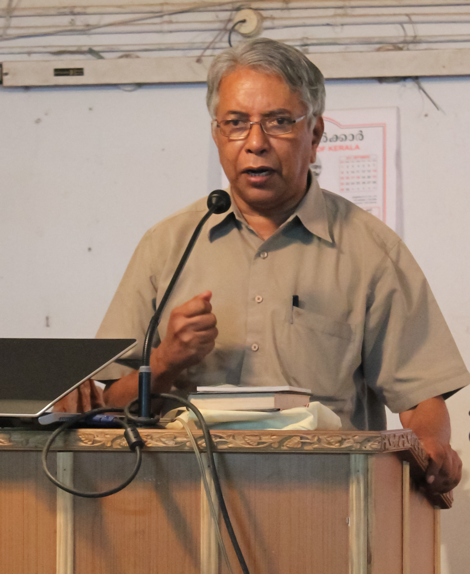 സ്കറിയ സക്കറിയയുടെ പ്രസംഗം